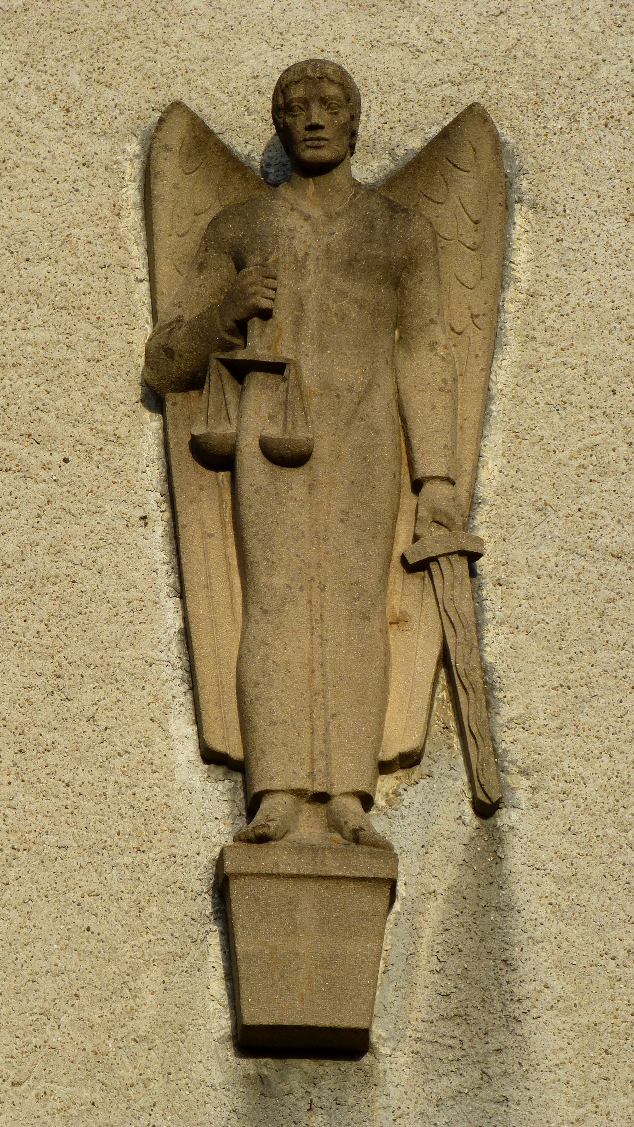 Mittlere Figur über dem Portal der Erlöserkirche in Lustenau